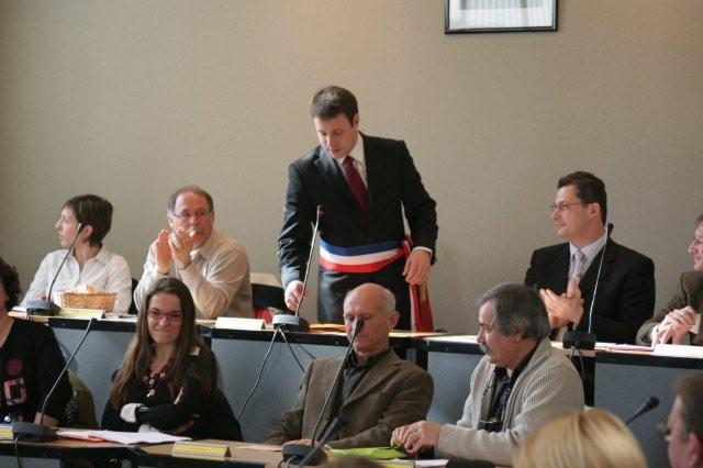 Election du Maire